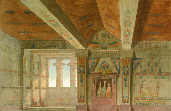 Esbós escenogràfic fet per Francesc Soler i Rovirosa per a l'òpera Aïda de Giuseppe Verdi, representada la Teatre Principal de Barcelona el 28 de març de 1876